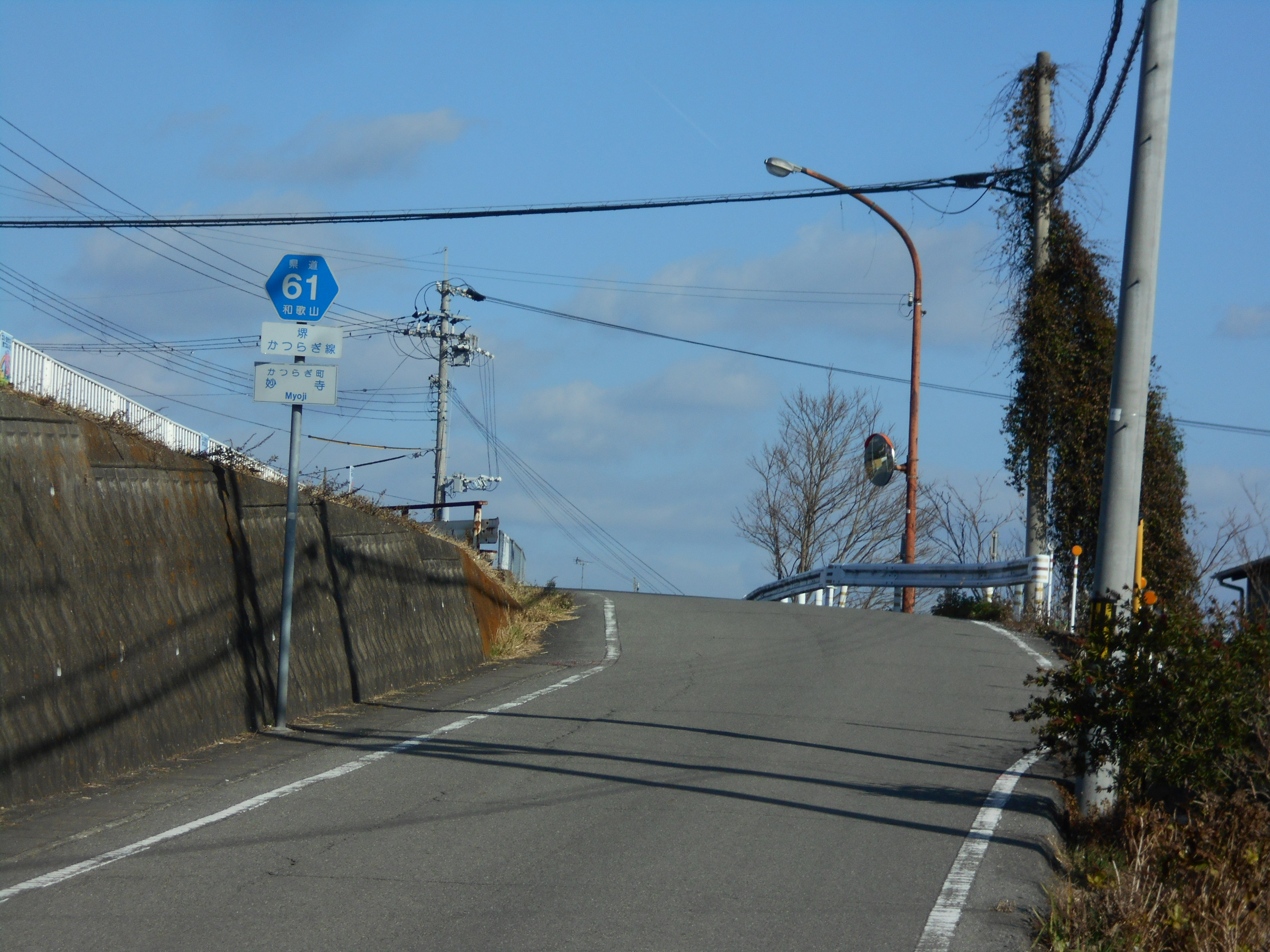 和歌山県道61号堺かつらぎ線（かつらぎ町妙寺）